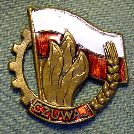 Czuwajka - odznaka Organizacji Harcerskiej Związku Młodzieży Polskiej okresu stalinowskiego